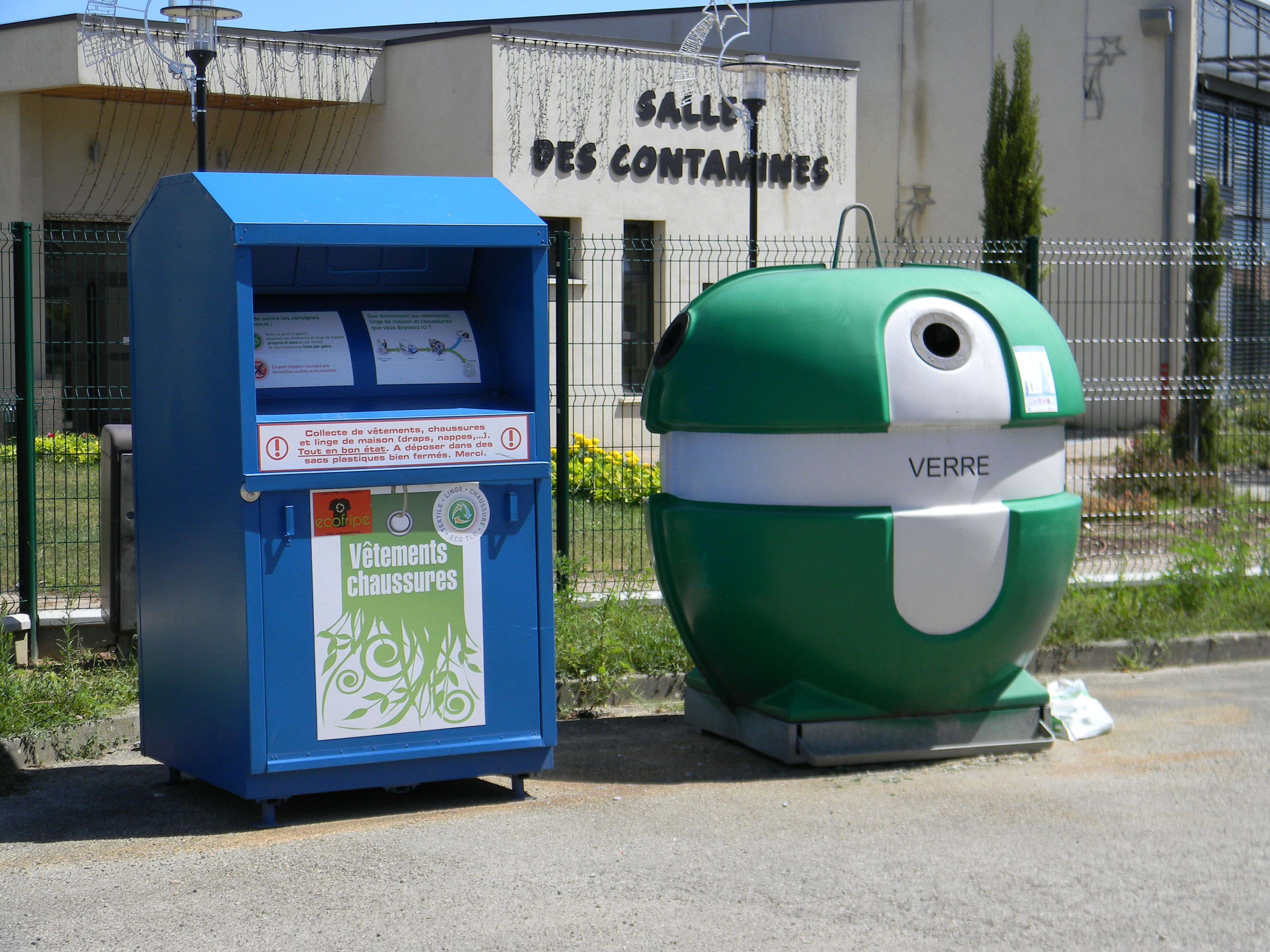 Conteneurs à verre et tissus à Chavanoz.